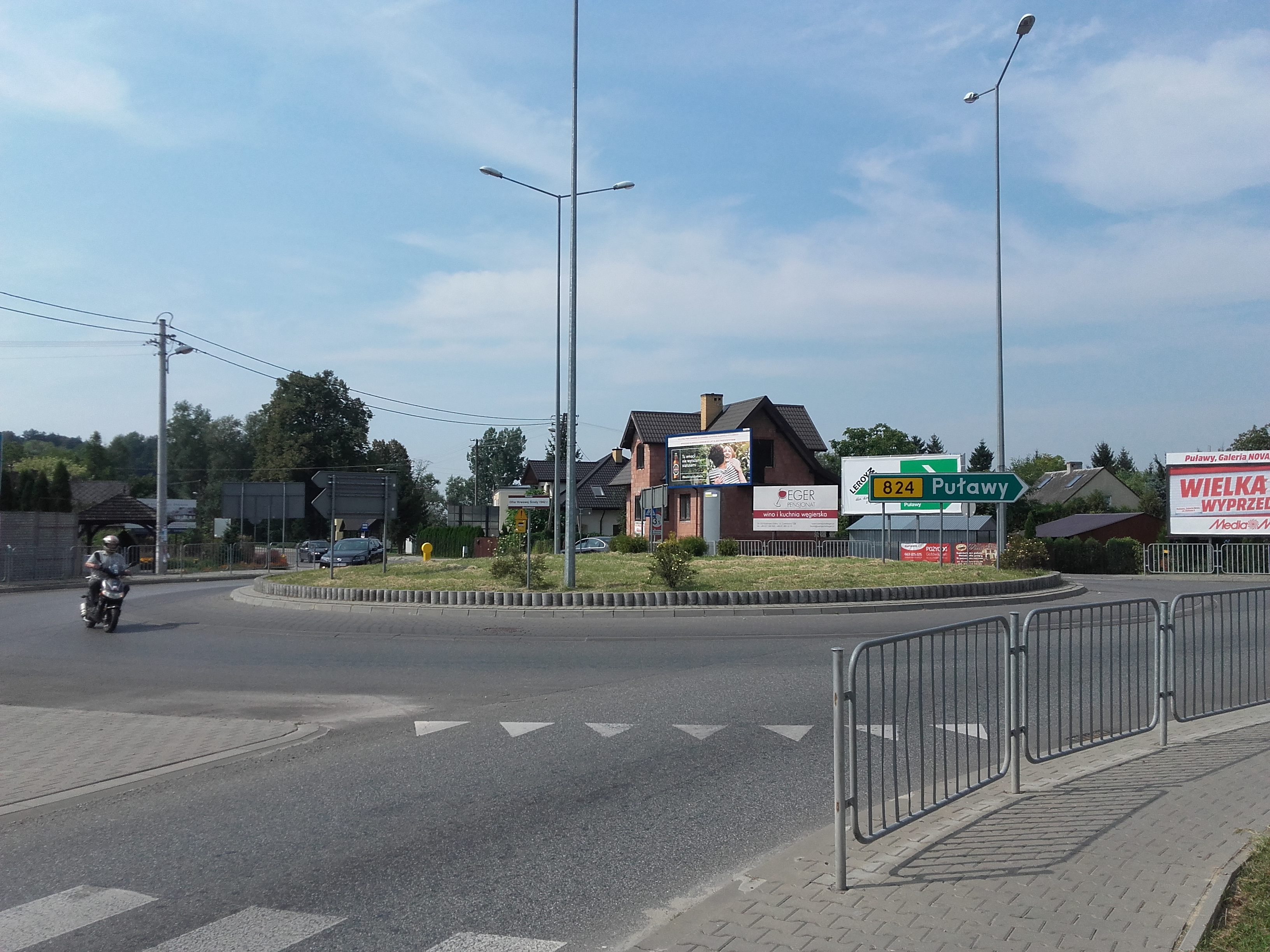 Rondo im. Ofiar Krwawej Środy 1942 w Bochotnicy